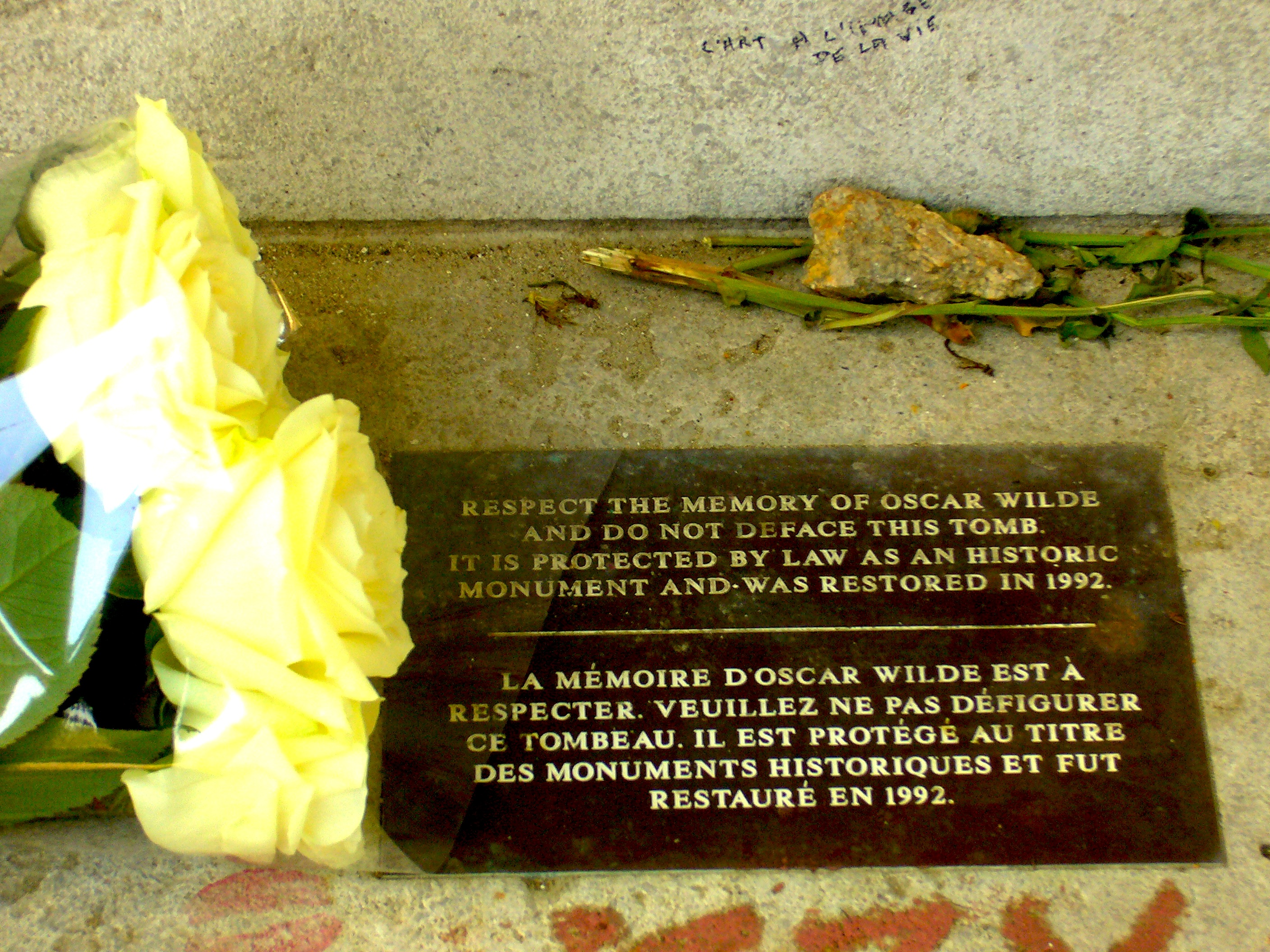 Plaque indiquant que le monument funéraire d'Oscar Wilde est protégé au titre des Monuments Historiques et restauré en 1992.